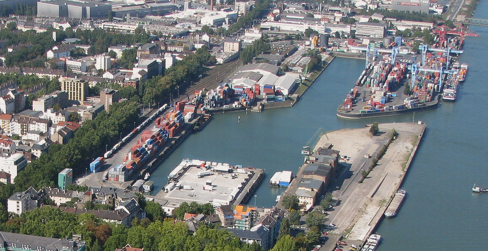 Luftbild Mainz: aus dem historischen Zollhafen wurde ein moderner Container- und Binnenhafen am Rhein